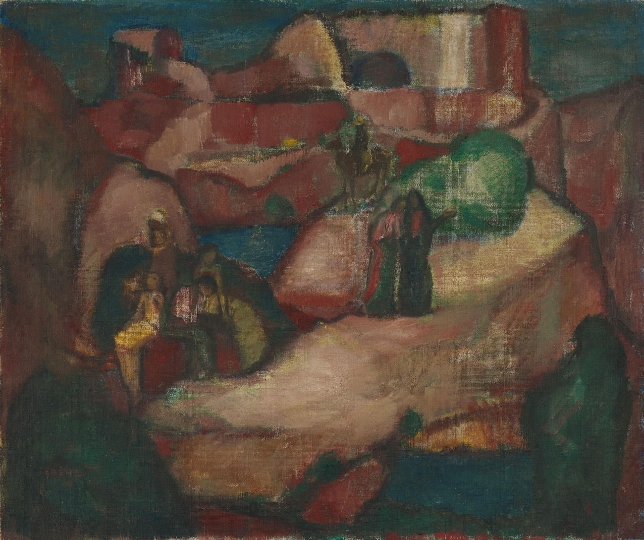 Biblische Landschaft. Öl auf Leinwand, 58.5 x 70 cm